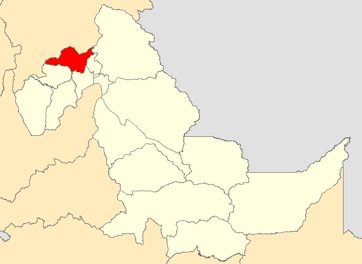 Mapa distrito Nueva Requena,Ucayali - Perú